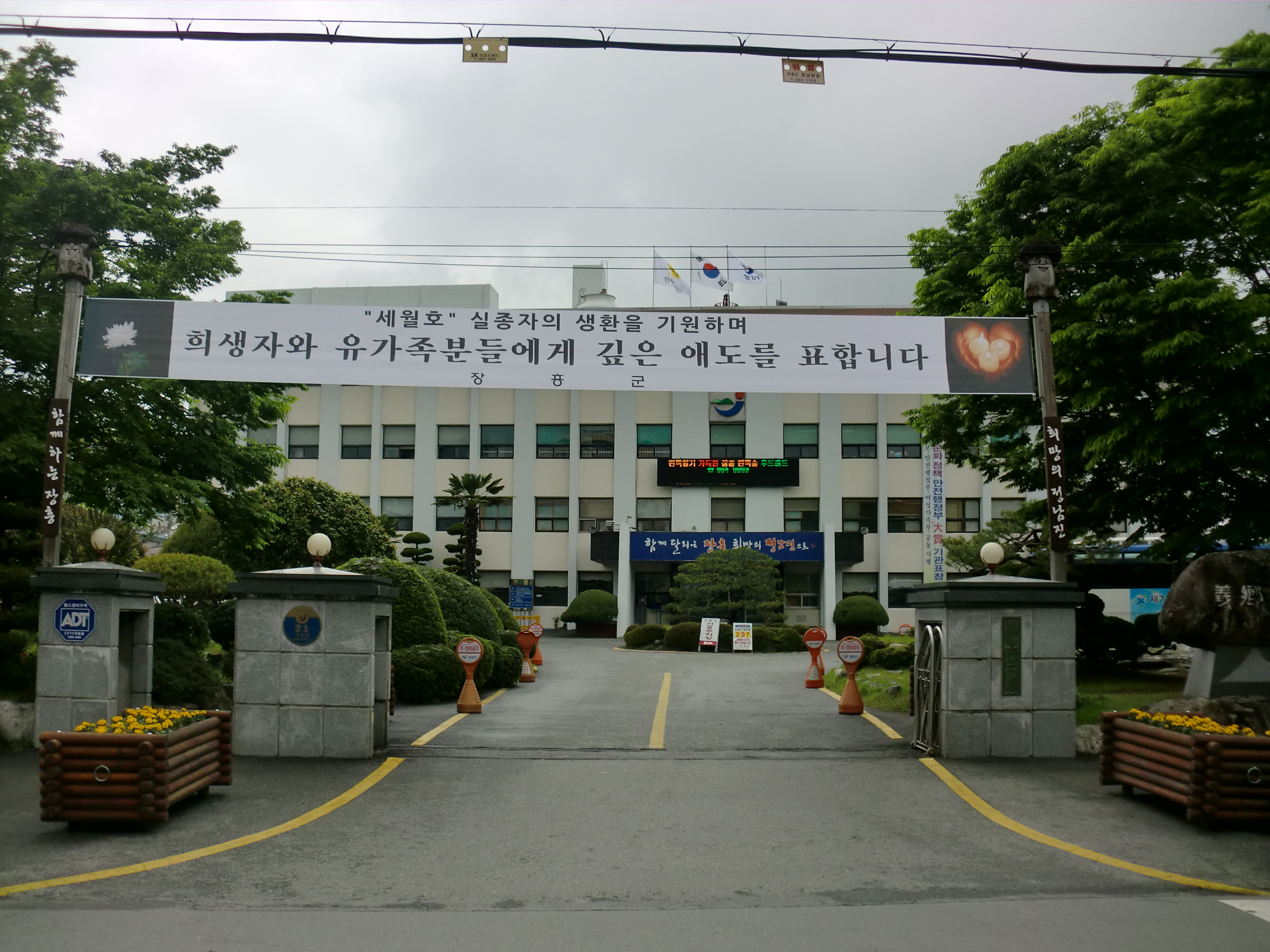 전람남도 장흥군에 있는 장흥군청